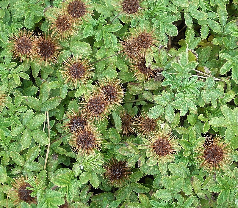 Acaena anserinifolia Acaena ovalifolia